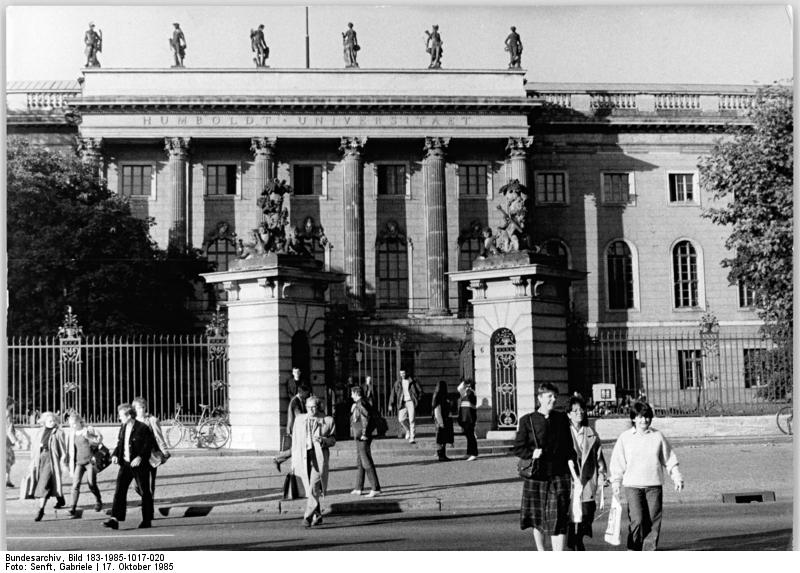 Berlin, Humboldt-Universität, Hauptgebäude ADN-ZB Senft 17.10.1985 Berlin: 175 Jahre Humboldt-Universität zu Berlin-275 Jahre Berliner Charité- Im Hauptgebäude Unter den Linden hat die Berliner Universität seit ihrer Gründung im Oktober 1810 ihren Sitz. Der Mittelbau wurde ursprünglich als Adelspalais für den Prinzen Heinrich von Preußen in den Jahren 1748-66 errichtet, vermutlich nach Plänen von Knobelsdorff. Seit ihrer Wiedereröffnung nach dem Kriege im Jahre 1946 trägt die Universität den Namen ihres Begründers. Wilhelm v. Humboldt. Zur Zeit gibt es an der Hochschule 12 500 Direktstudenten und insgesamt 30.000 Wissenschaftler, Studenten und Angestellte. (siehe 21 und 22 N)